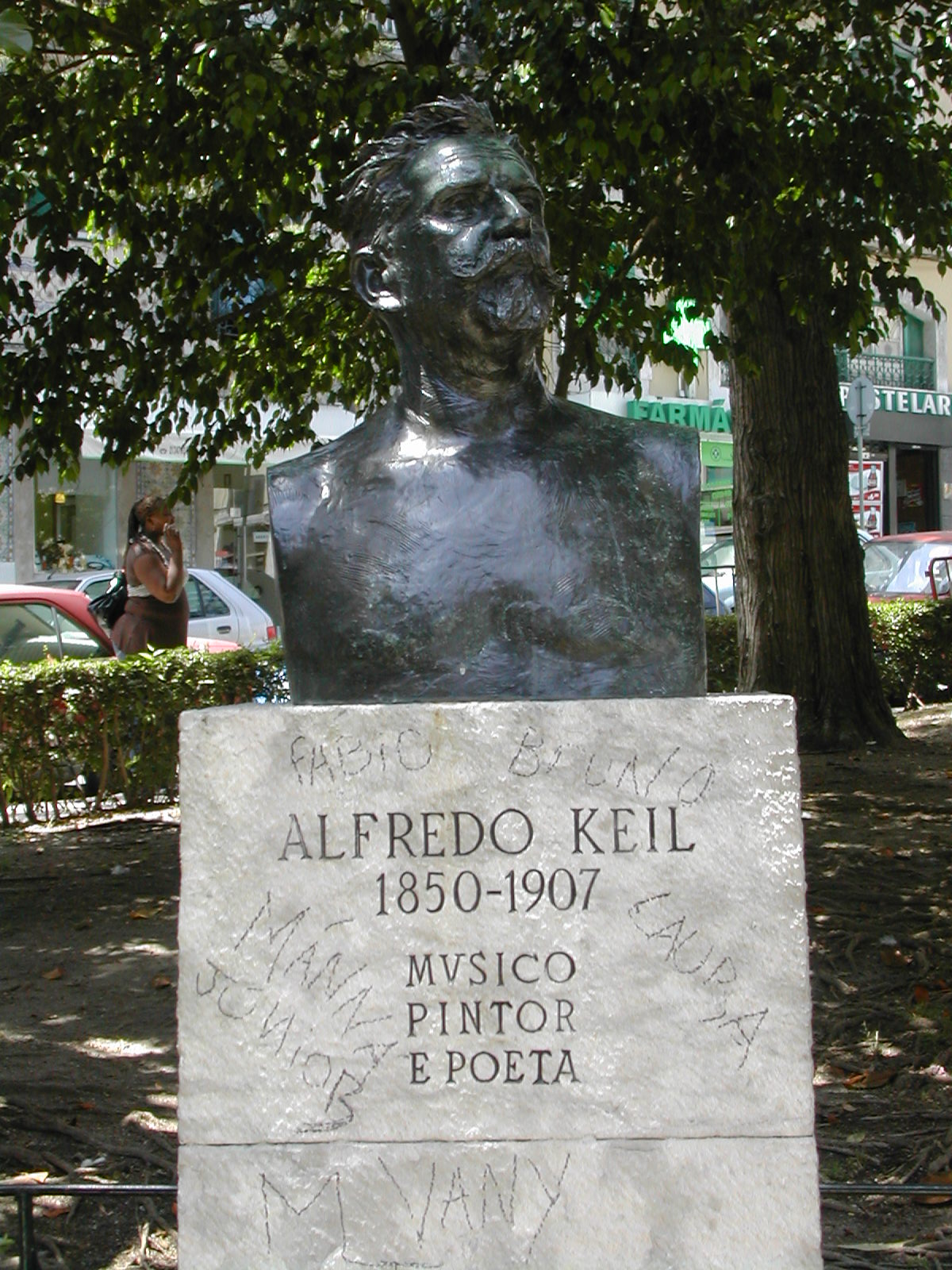 Busto de Alfredo Keil, Jardim Alfredo Keil, Praça da Alegria, Lisboa